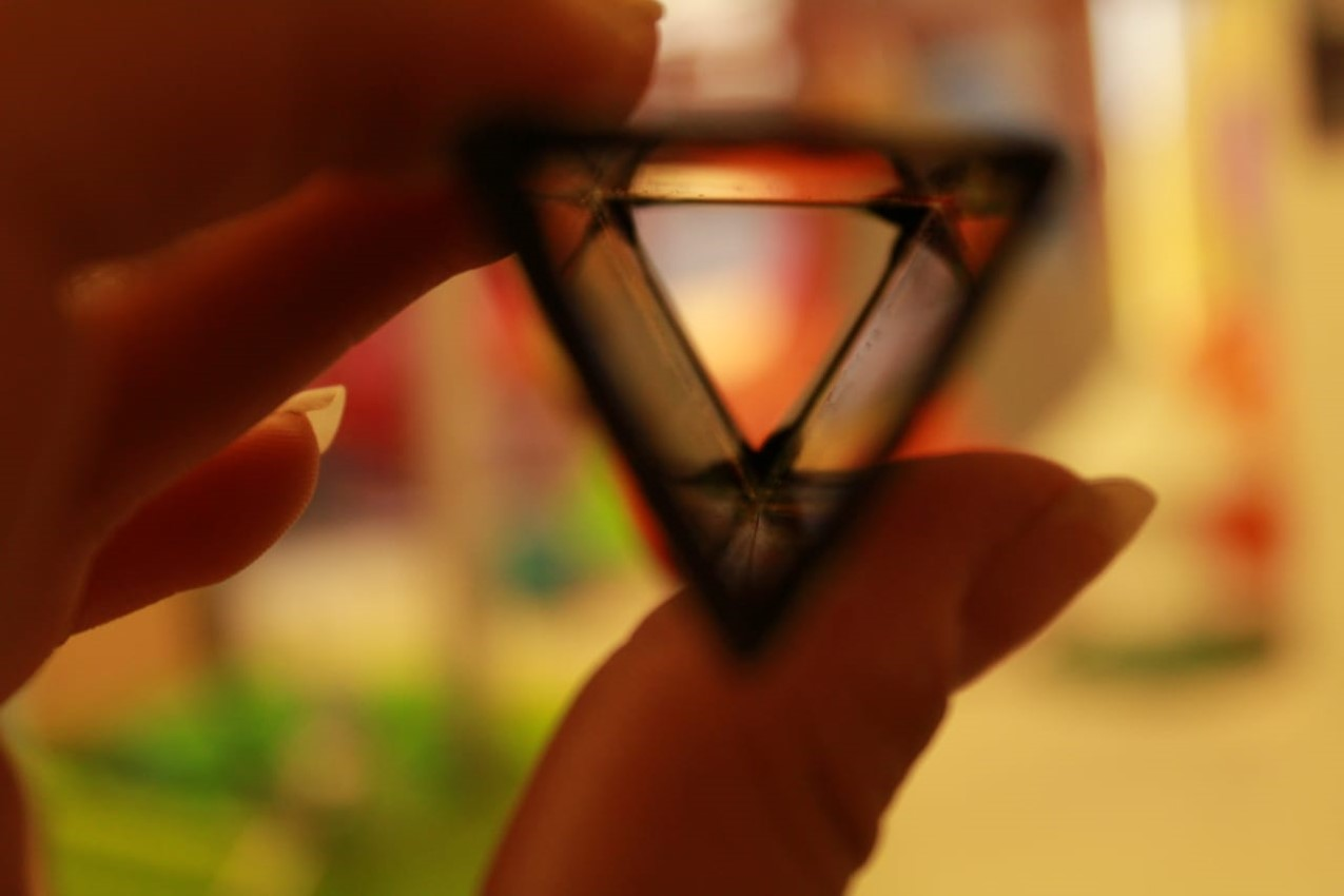 ML_Caleidoscopio